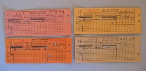 Zelfgefotografeerde media van kaartjes uit mijn verzameling